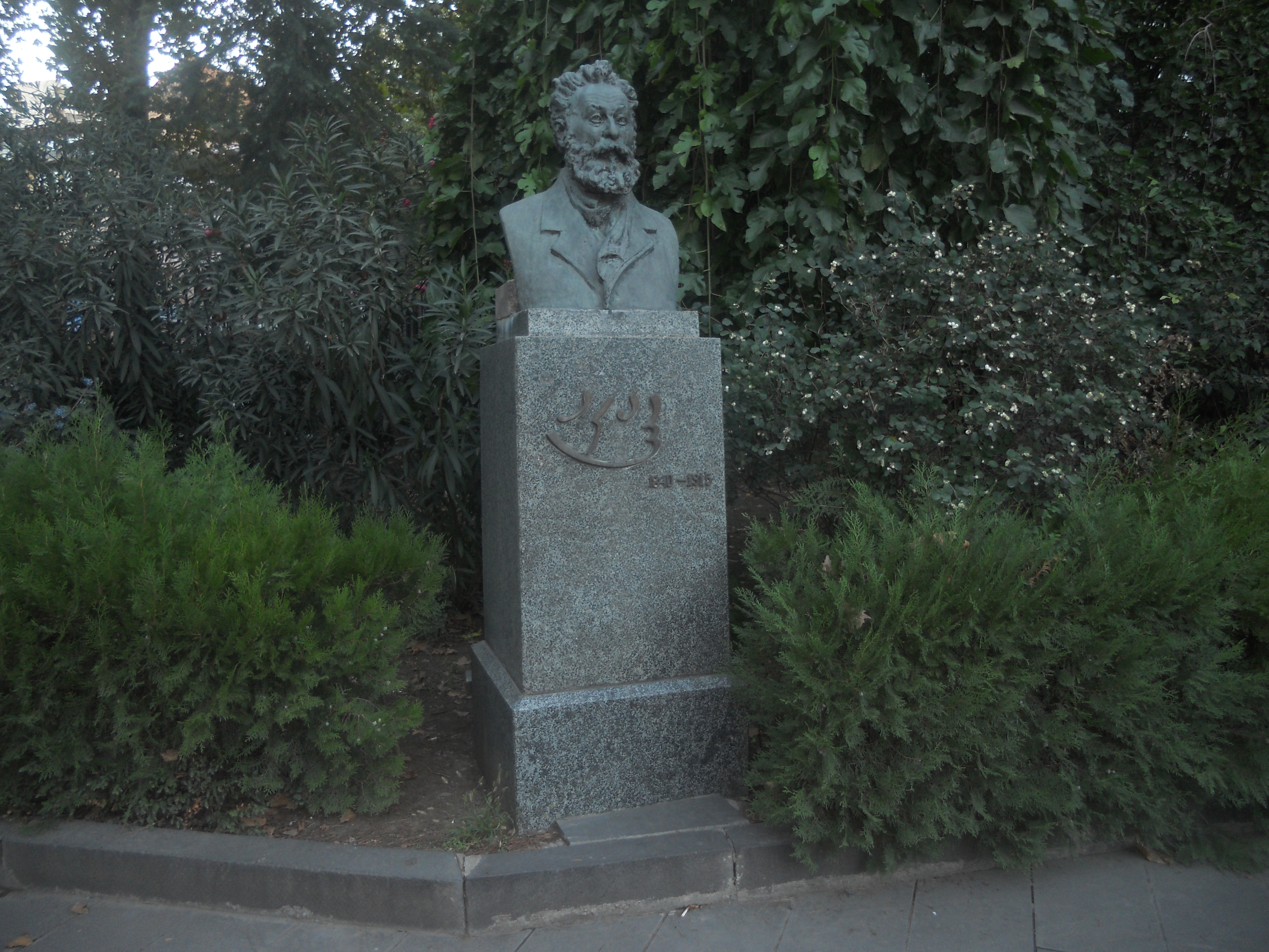 სახელმწიფო უნივერსიტეტის I კორპუსი